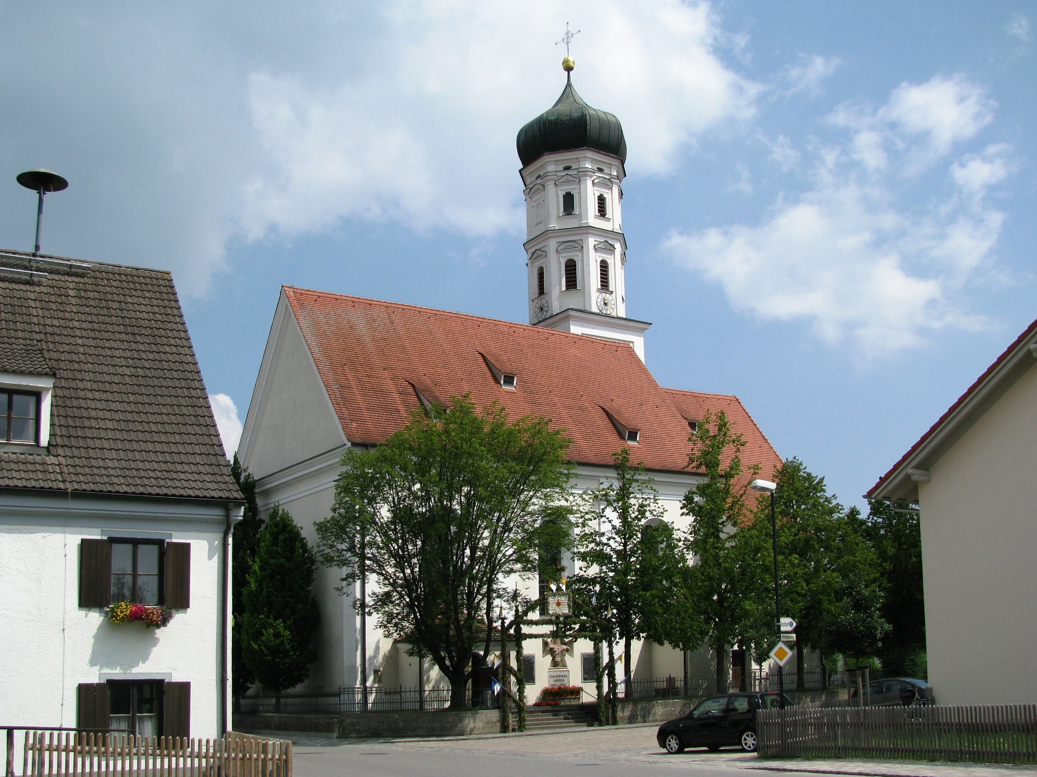 Pfarrkirche in Raisting; Neubau 1694 ff. von Michael Natter, 1766 ff. umgestaltet This is a photograph of an architectural monument.